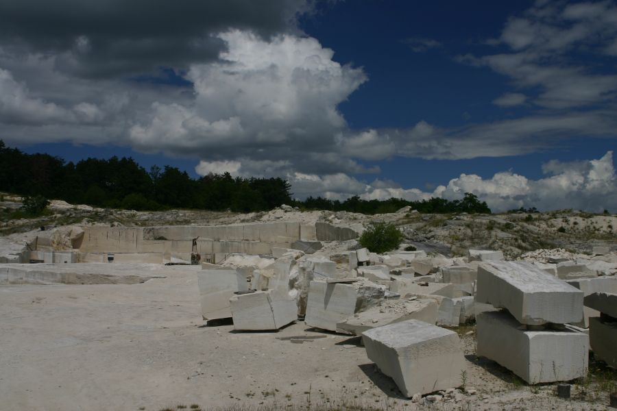 Lajtamészkőbánya Fertőrákoson (Győr-Moson-Sopron megye)